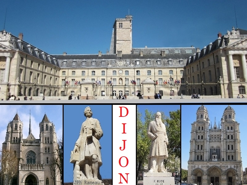 Patrimoine dijonnais : Palais des ducs - cathédrale st Bénigne - église st Michel - statues de J.Ph. Rameau et de F. Rude